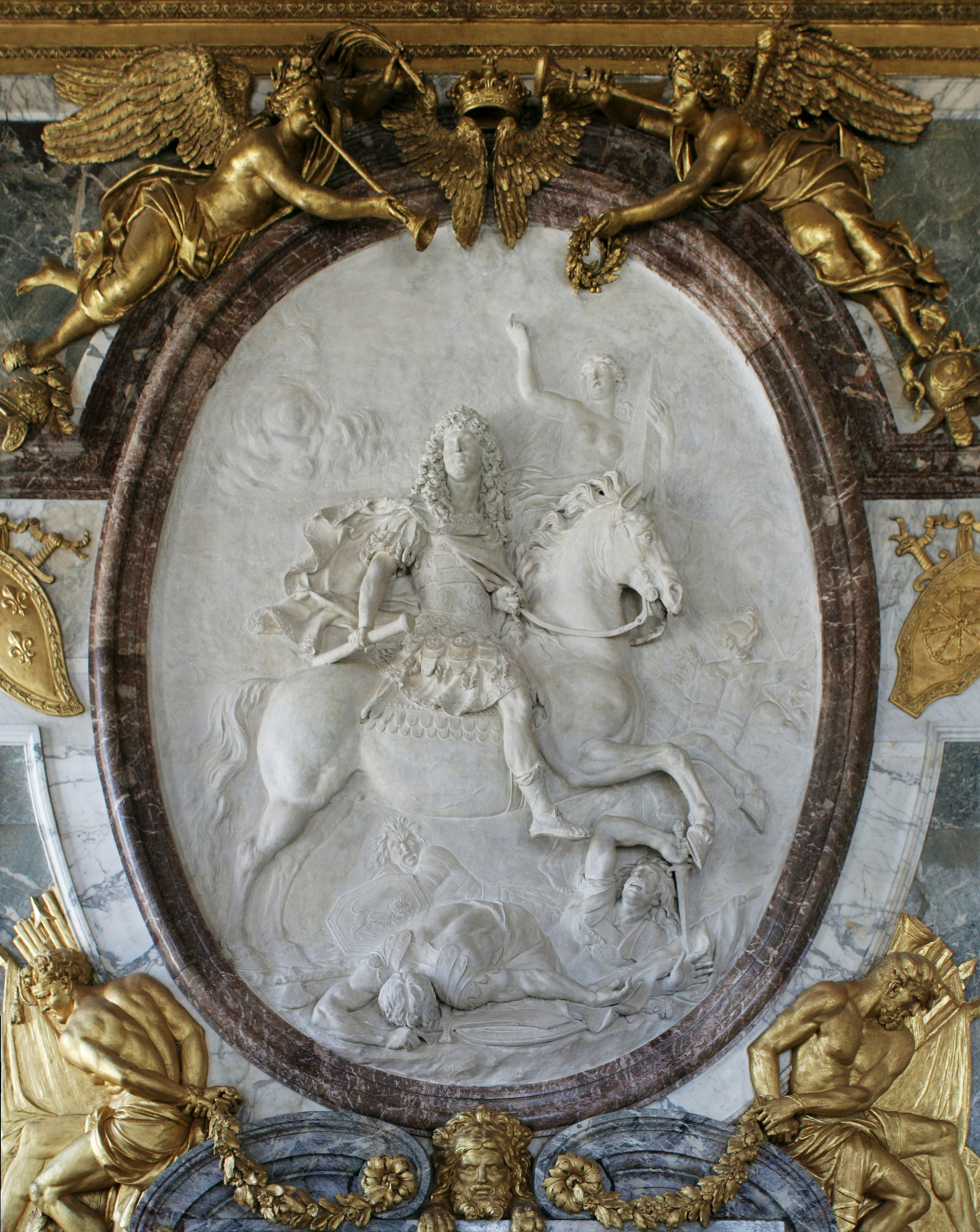 Château de Versailles, salon de la guerre, Louis XIV en empereur romain vainqueur, par Antoine Coysevox, 1715, plâtre.